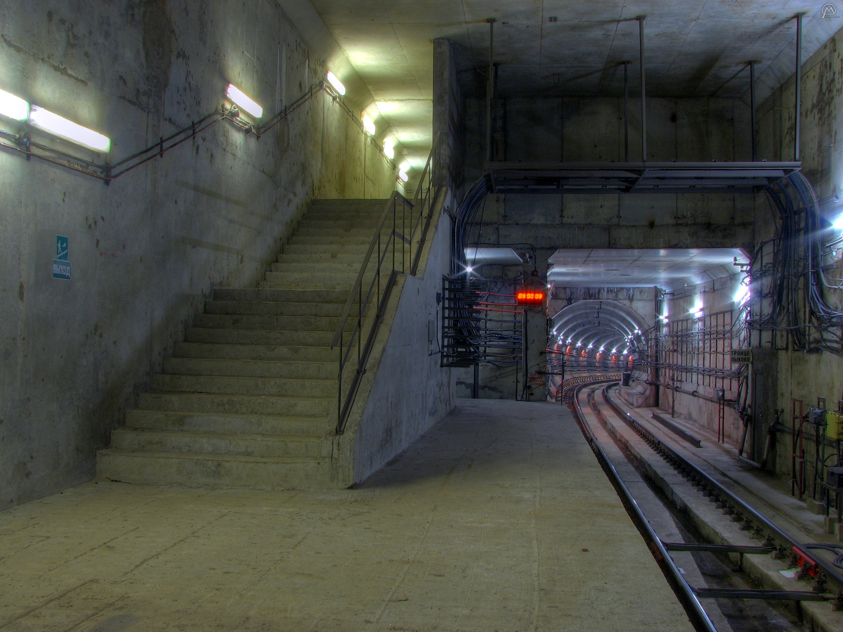 Техническая станция Троице-Лыково. Платформа на 1 пути